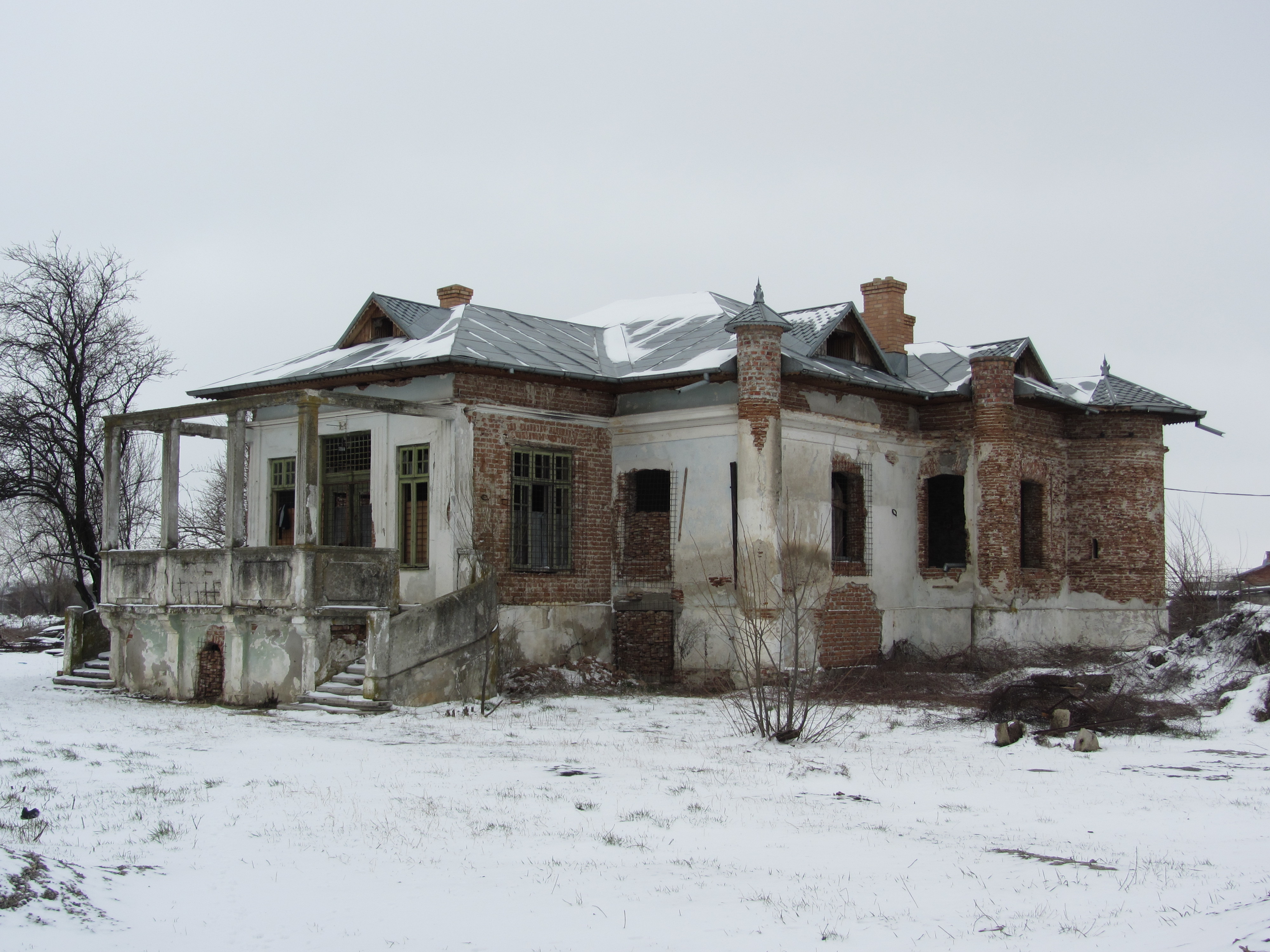 Casa Mavrache, acum proprietate privată